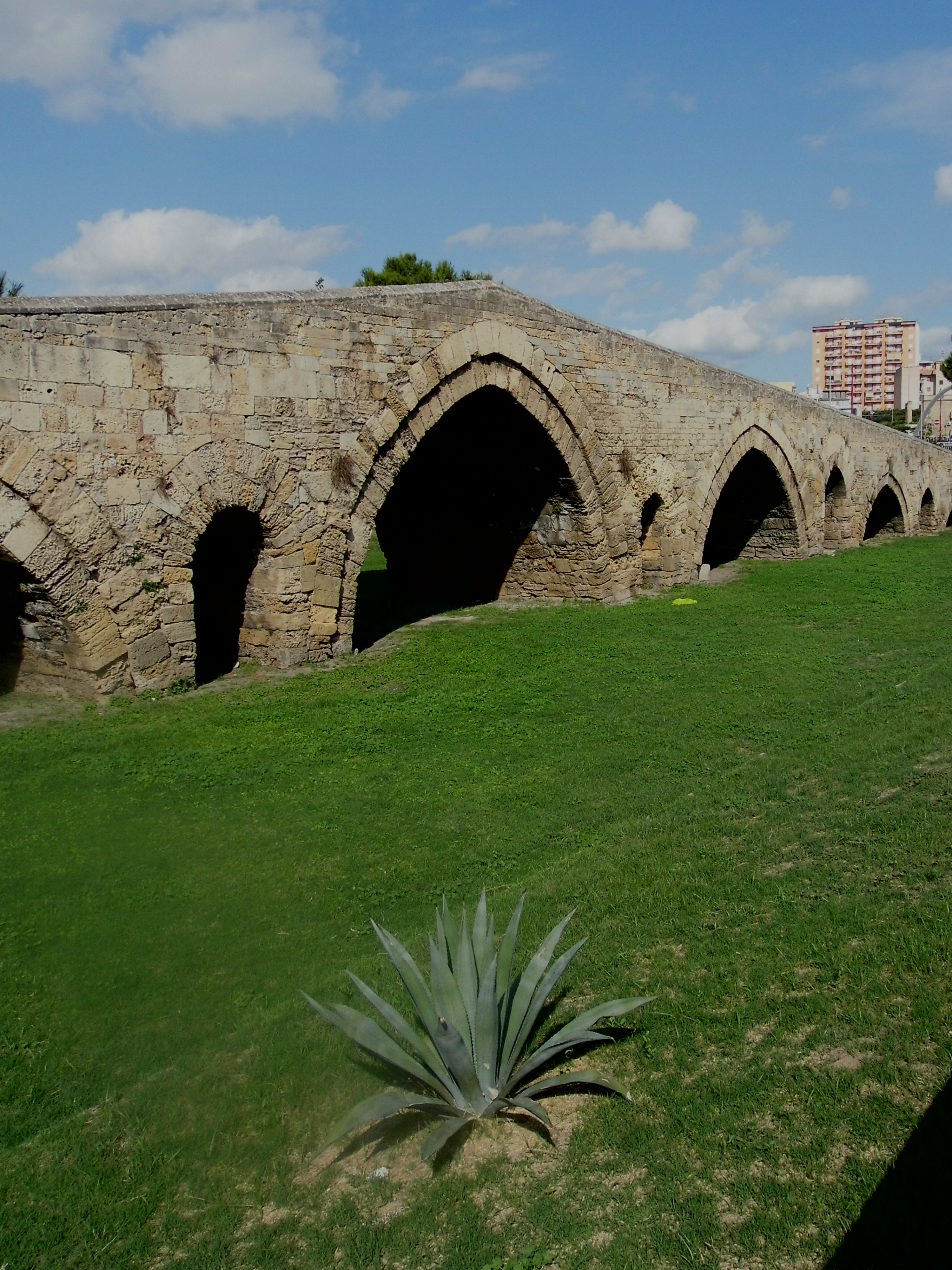 Ponte dell'Ammiraglio This is a photo of a monument which is part of cultural heritage of Italy.